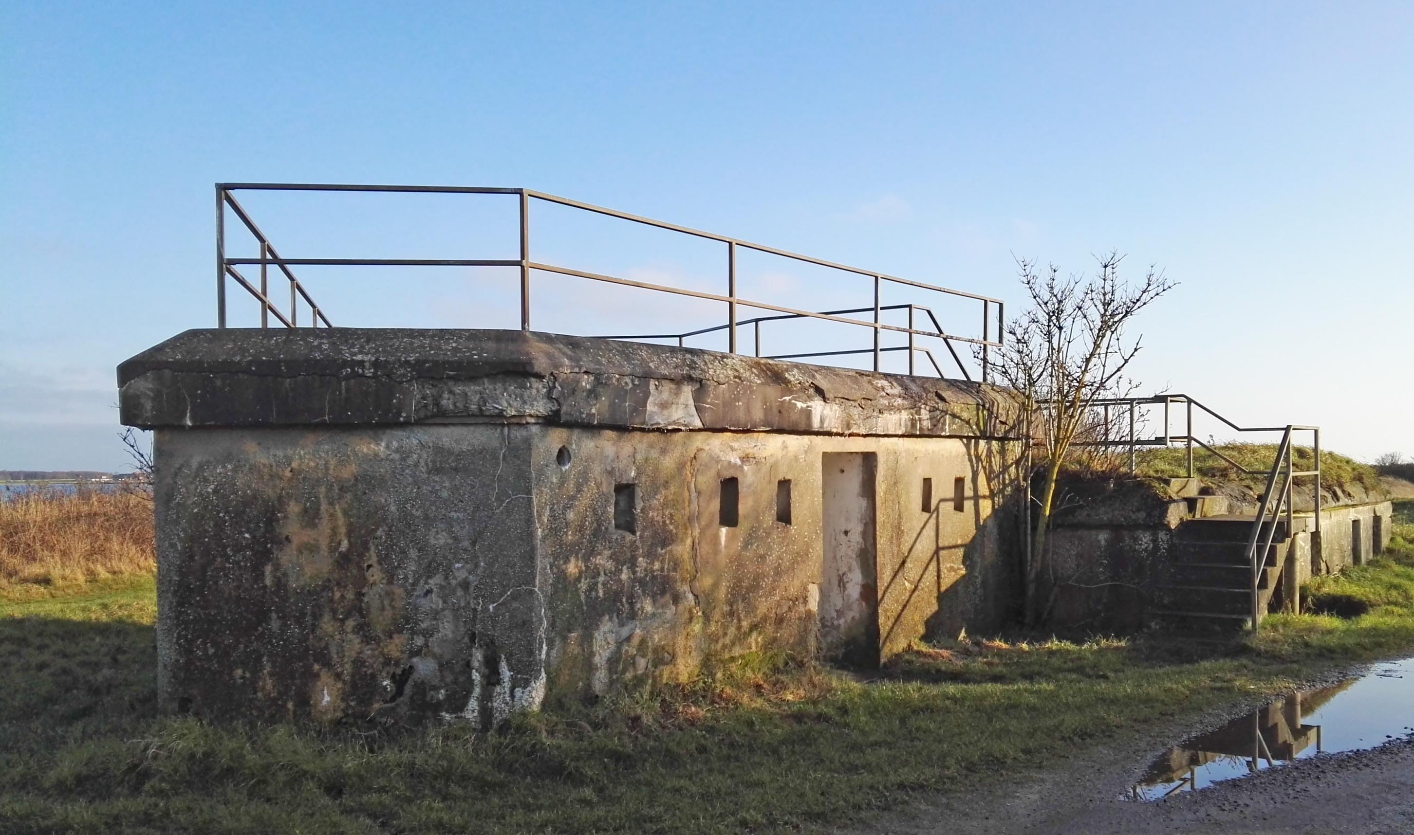 Årøsund Batteri fra vest